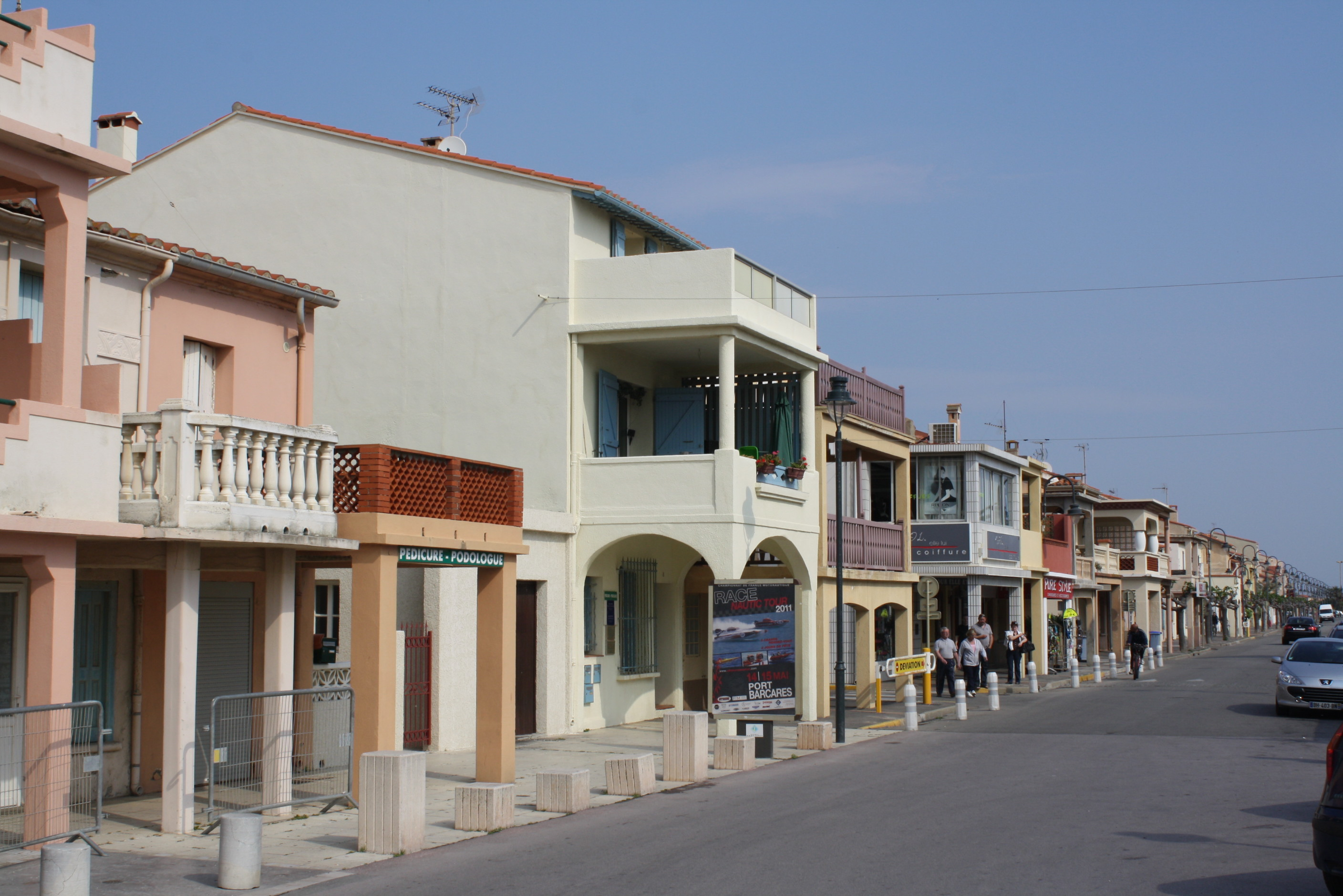 Maisons typiques